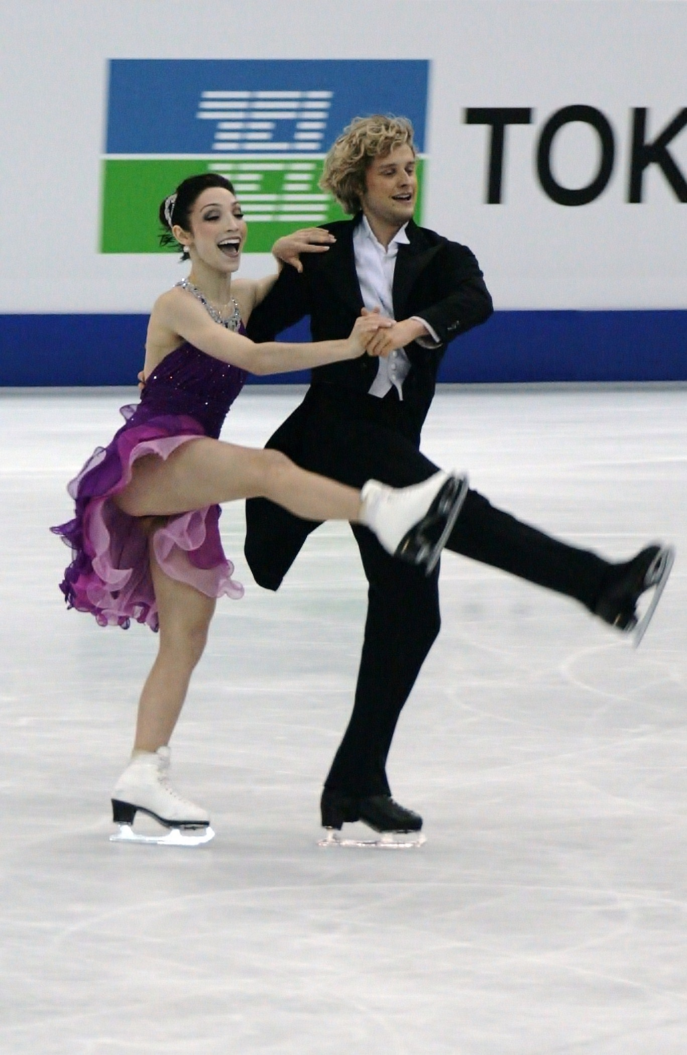 Мэрил Дэвис и Чарли Уайт (США) на чемпионате мира по фигурному катанию 2012